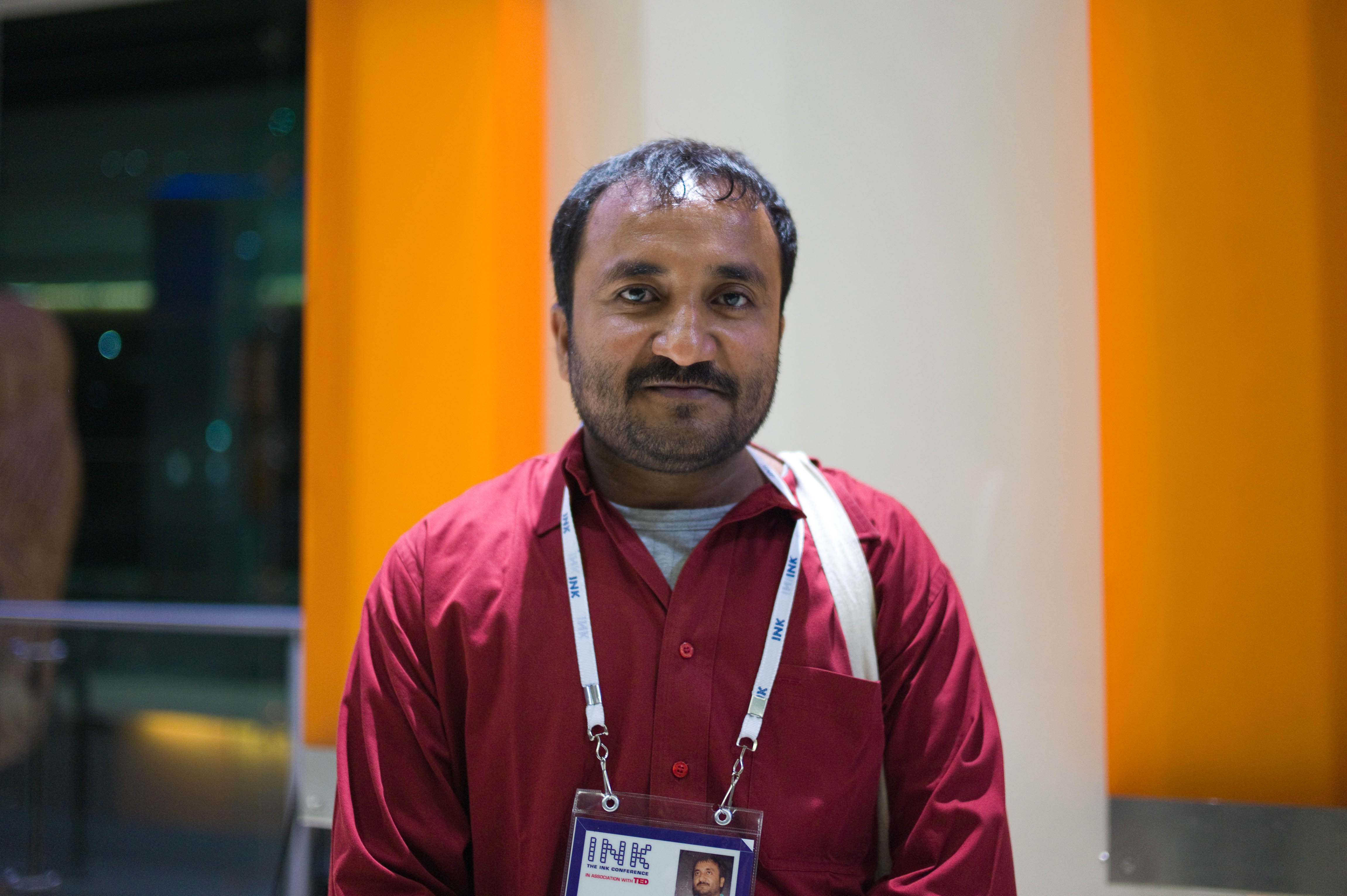 Anand Kumar